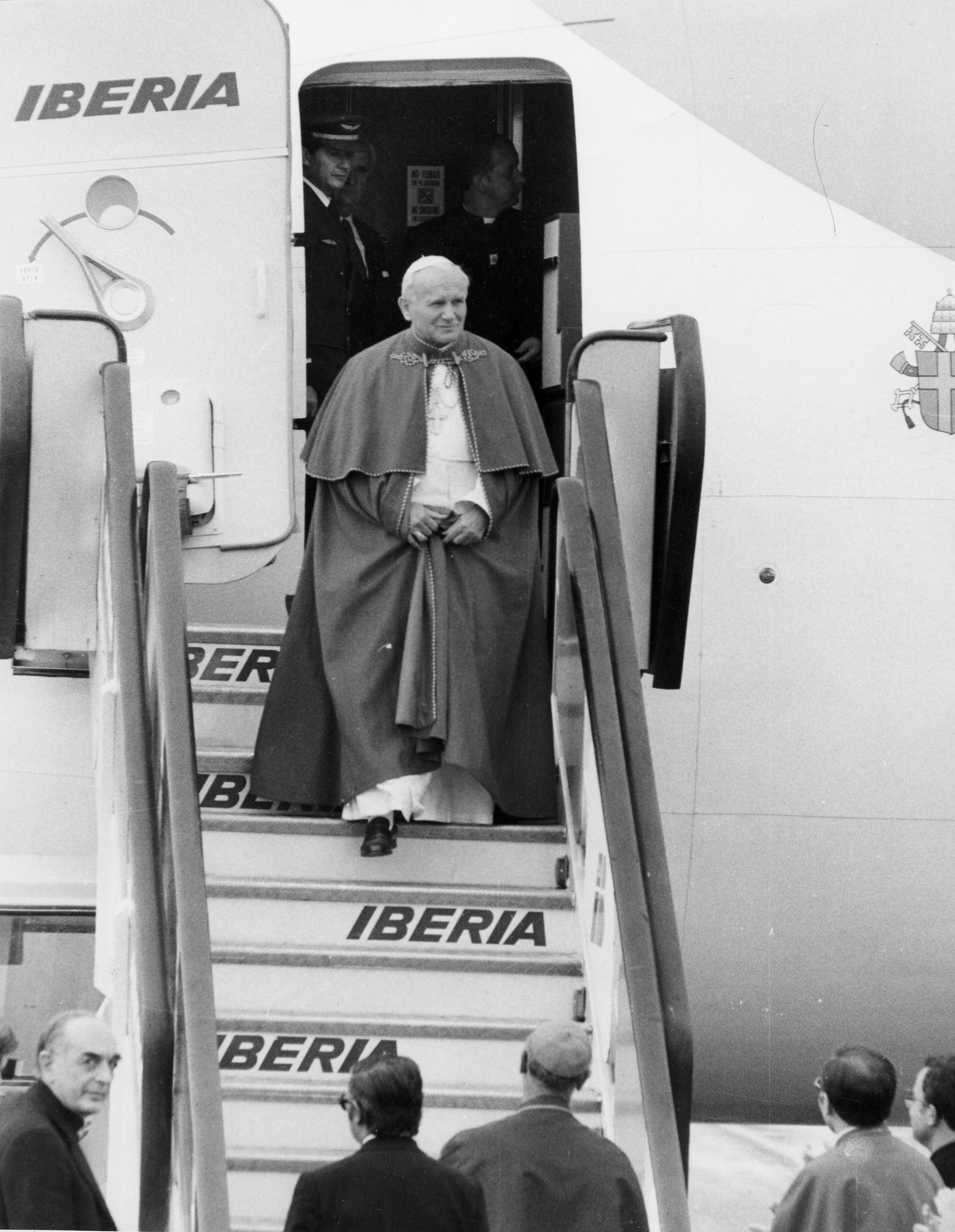 Su Santidad el Papa Juan Pablo II desembarcando del B-727 matrícula EC-CBC nombre Navarra, a su llegada a Santiago de Compostela en su primer vuelo a España donde permaneció del 31 de octubre al 9 de noviembre de 1982.